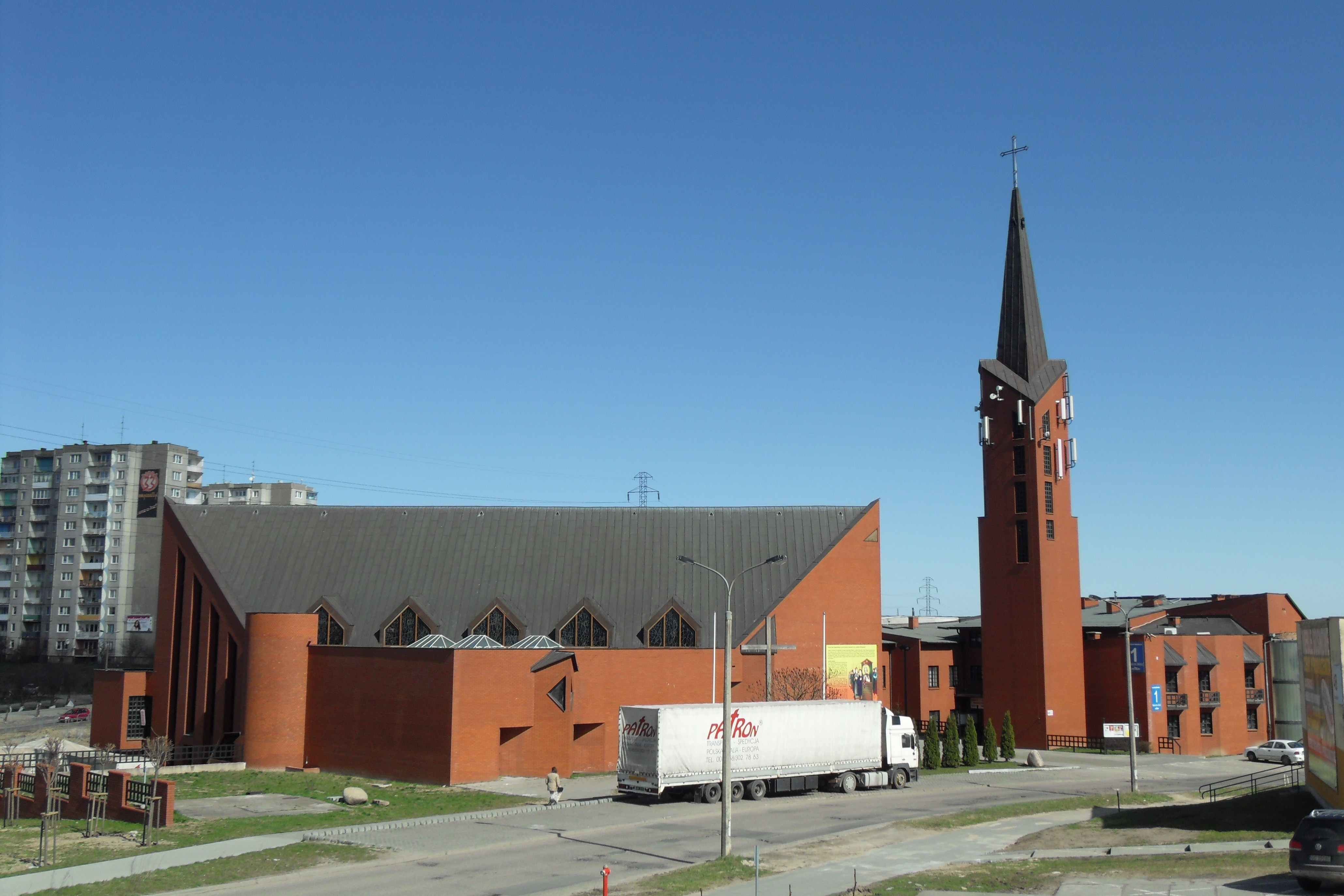 Gdańsk Chełm - kościół pw. św. Urszuli Ledóchowskiej, ul. Cieszyńskiego 1.